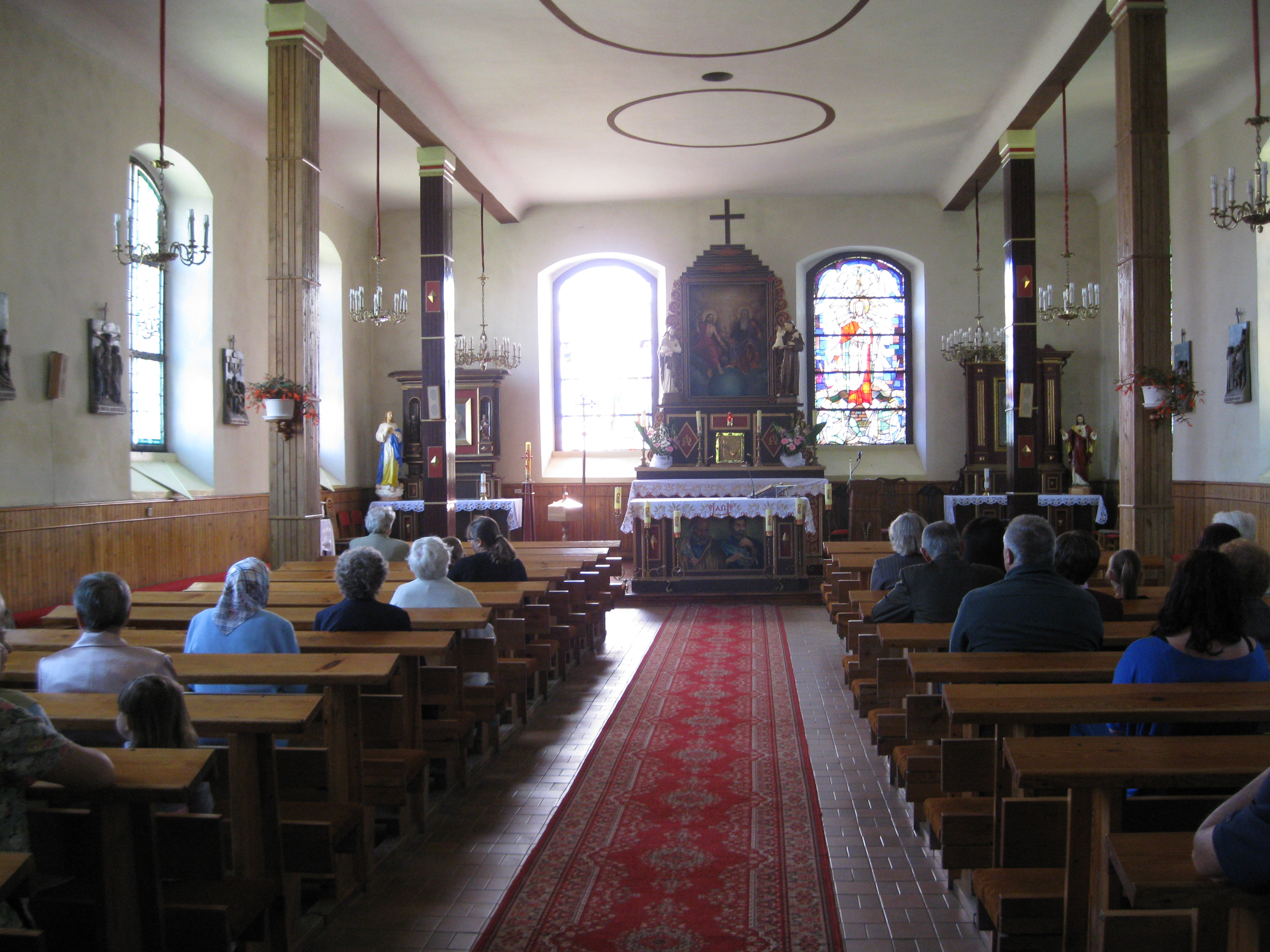 zespół kościoła ewangelickiego ob. par. rzym.-kat. p.w. Św. Trójcy kościół ewangelicki cmentarz przy kościele ewangelickim Budry, Budry